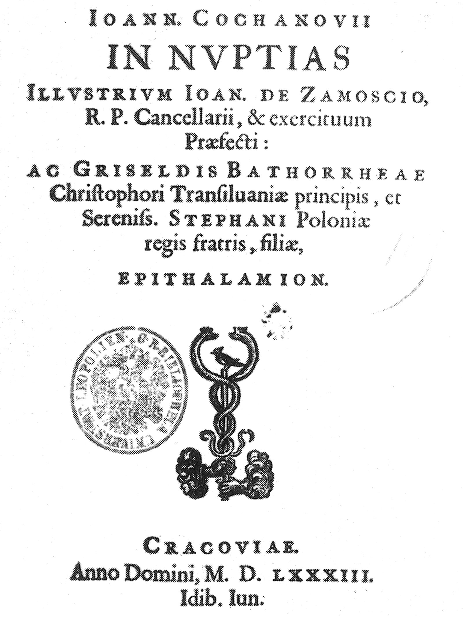 Strona tytułowa In Nuptias illustrium Joan. de Zamoscio, R. P. cancellarii et exercituum praefecti, ac Griseldis Bathorrheae Christophori Transilvaniae princips et serenis. Stephani Poloniae regis fratris, filiae, epithalamion Jana Kochanowskiego